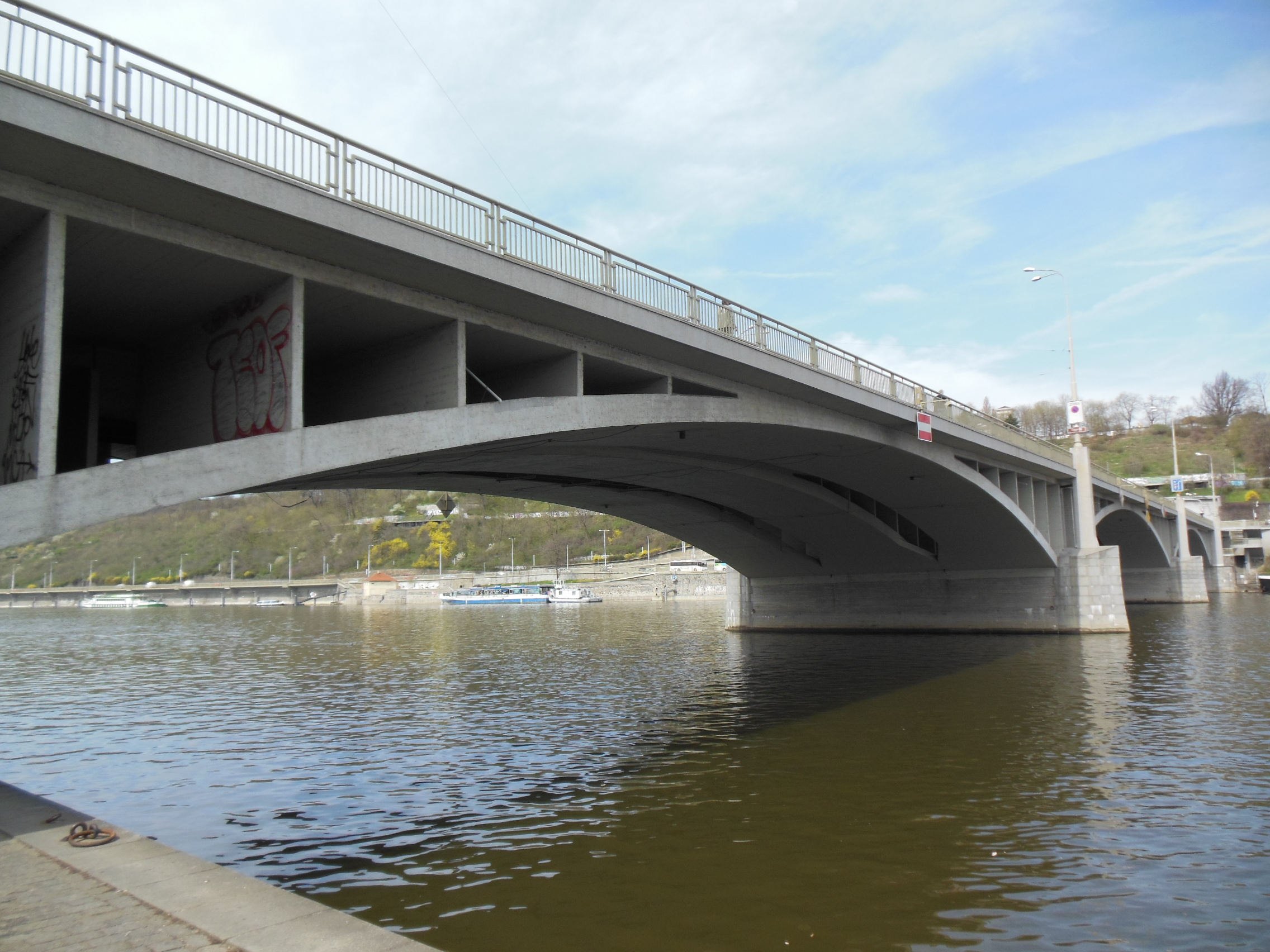 Štefánikův most v Praze.